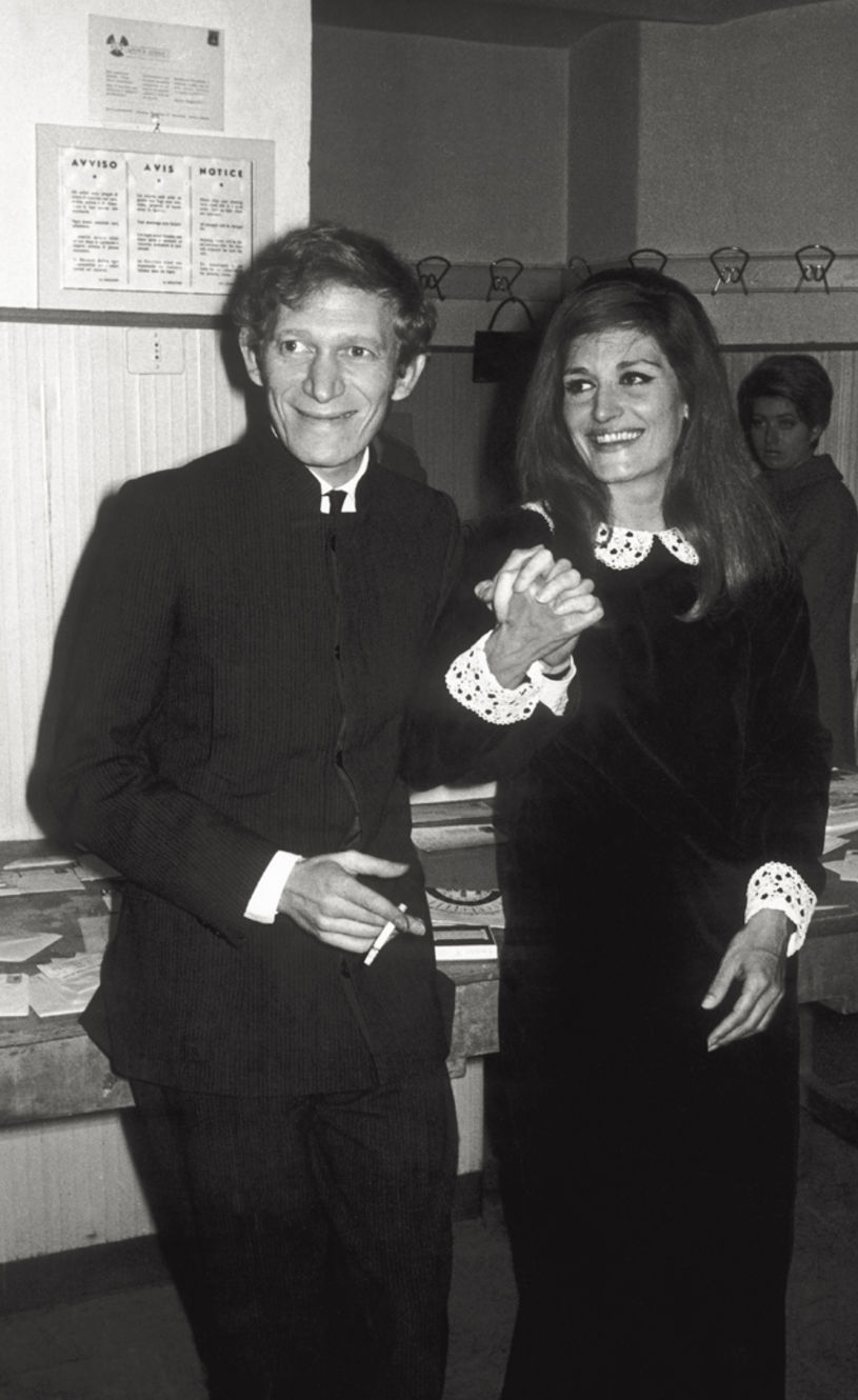 1967 à SanRemo